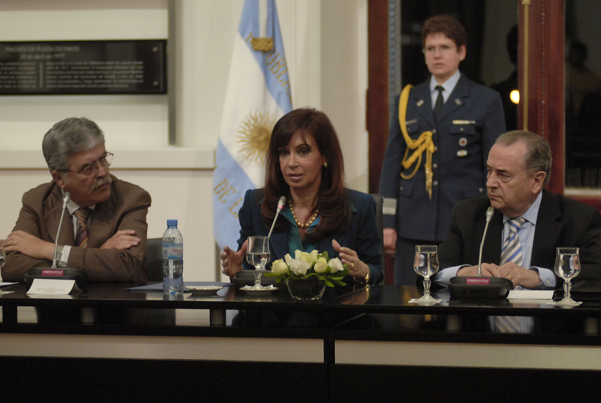 La Presidenta Cristina Fernández junto al ministro Julio De Vido y el gobernador de La Pampa, Oscar Jorge, en el Salón Mujeres Argentinas del Bicentenario, de Casa de Gobierno.